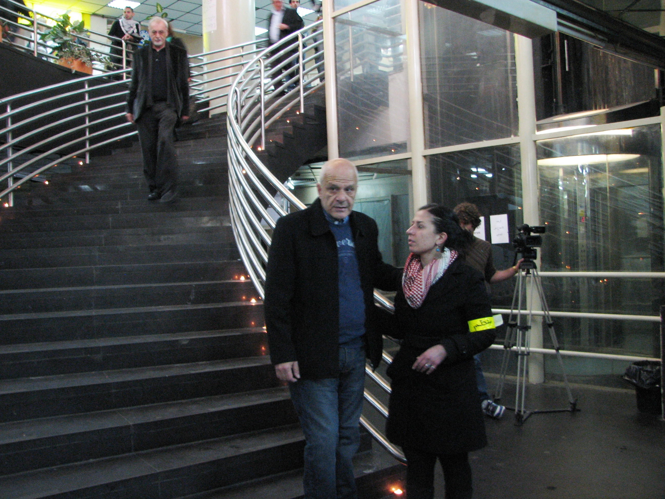 Youssef Abu Warda (center), Israeli stage, film and television actor. He is an Arab citizen of Israel. Photographed at the funeral of actor Juliano Mer. Also in the photo: Issam Makhoul (descending stairs), former MK of the Hadash party. יוסף אבו ורדה הוא שחקן תיאטרון, קולנוע וטלוויזיה ערבי-ישראלי.. התמונה צולמה בהלוויתו של השחקן ג'וליאנו מר. יוסף אבו ורדה במרכז התמונה, יורד במדרגות חבר הכנסת לשעבר עיסאם מח'ול